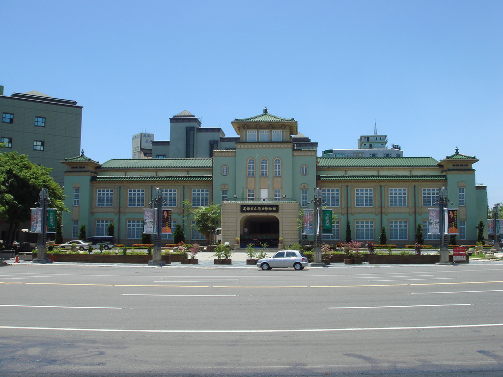 高雄市立歷史博物館正面。注意門口停了一輛大卡車。